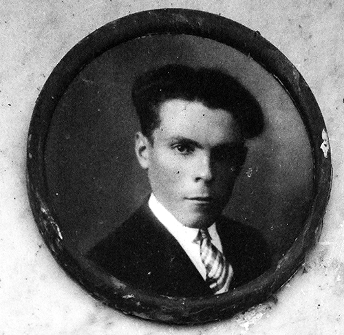 Arcangelo Tiziani, (* 9-01-1907 + 22-03-1959 ) operaio invalido, di professione carpentiere nell'impresa di costruzioni Cargnel, impegnata nella costruzione della centrale idroelettrica, sottostante alla diga di Pontesei sul torrente Mae' nel comune di Forno di Zoldo (BL). La Domenica di Pasqua del 22 Marzo 1959, fu l'unica e sfortunata vittima travolto dall'onda, del lago provocata dalla caduta della frana. Abitante a Forno di Zoldo, quella Domenica, era di sorveglianza alle attrezzature e al cantiere della centrale in costruzione.